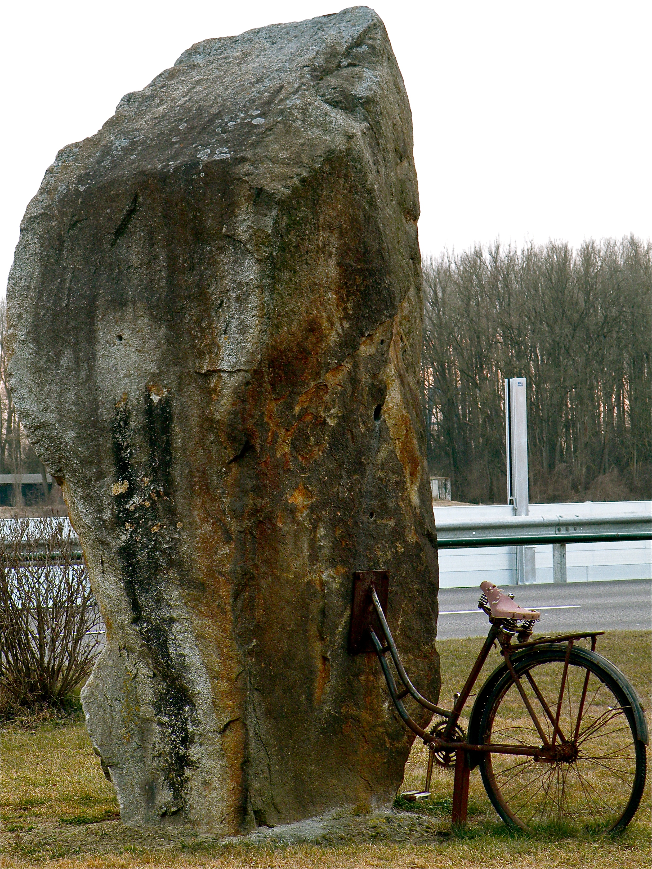 Monolith mit Fahrrad in Mauthausen im Bezirk Perg in Oberösterreich